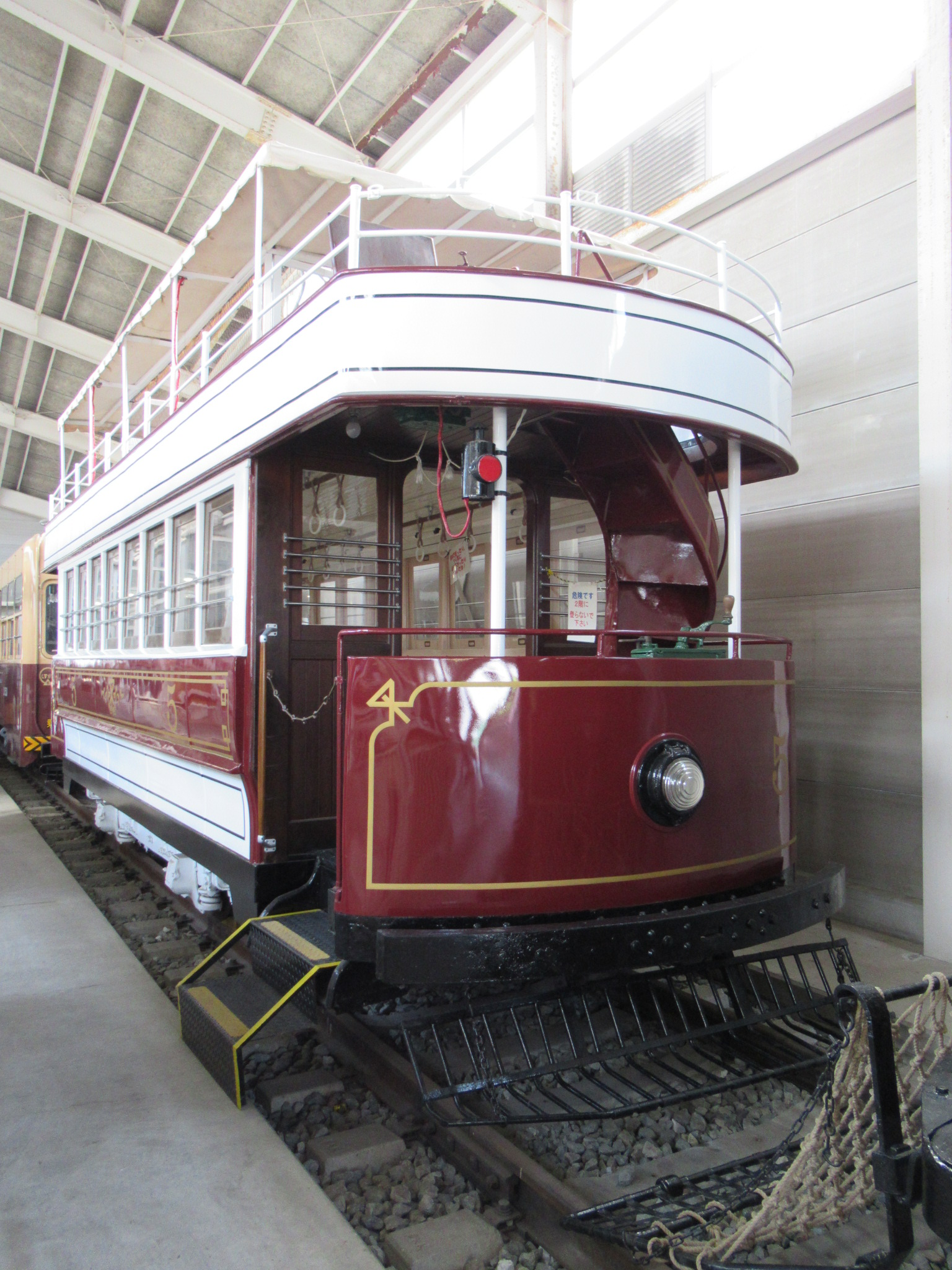 大阪市電5号復元車